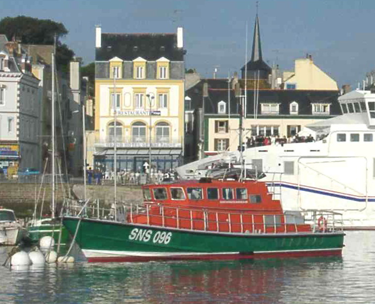 Canot de sauvetage de Belle-Île-en-Mer (SNS 096). Lieu : Belle Ile en Mer, Bretagne, France